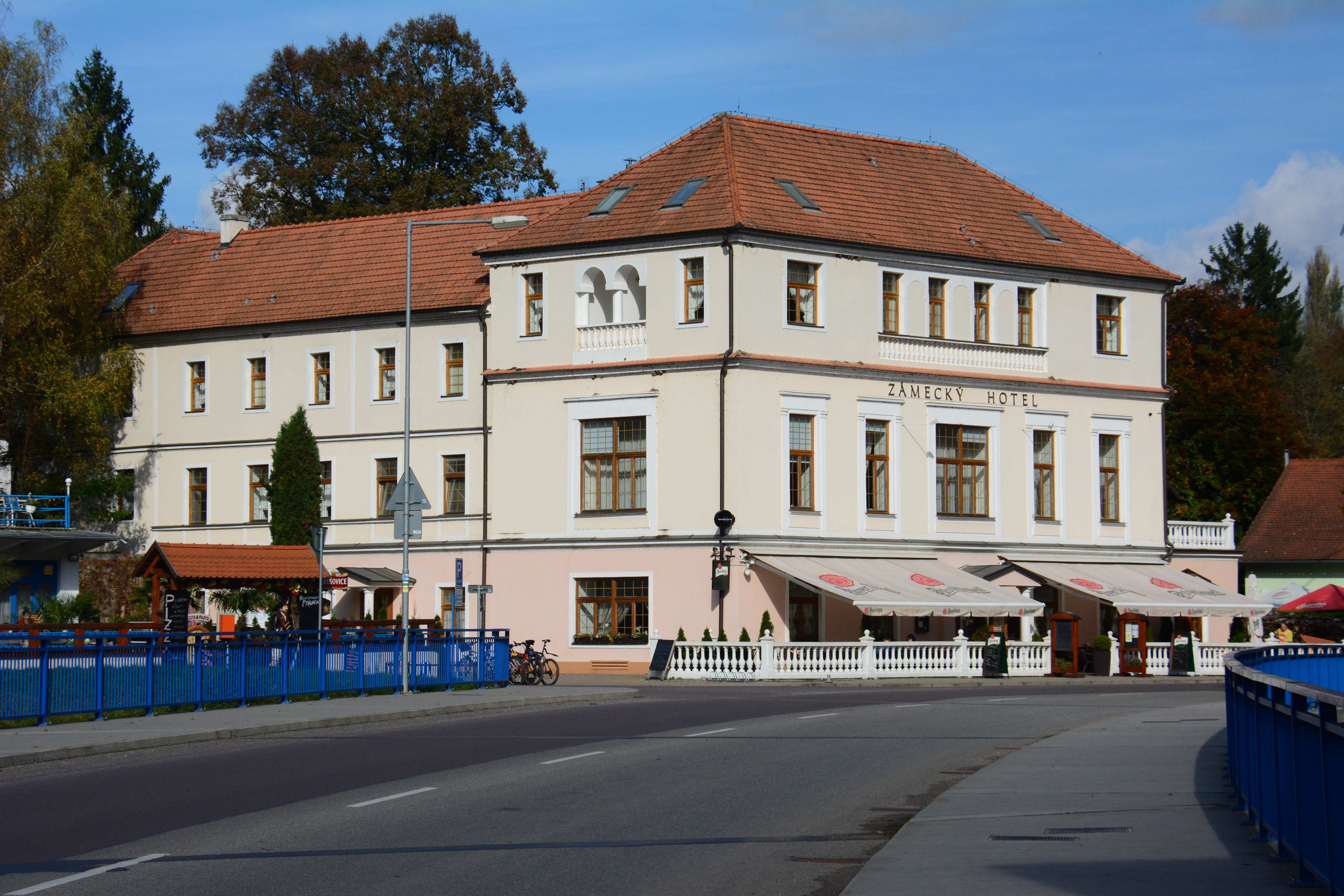 Das ehemalige Direktionsgebäude der Frainer Geschirrfabrik